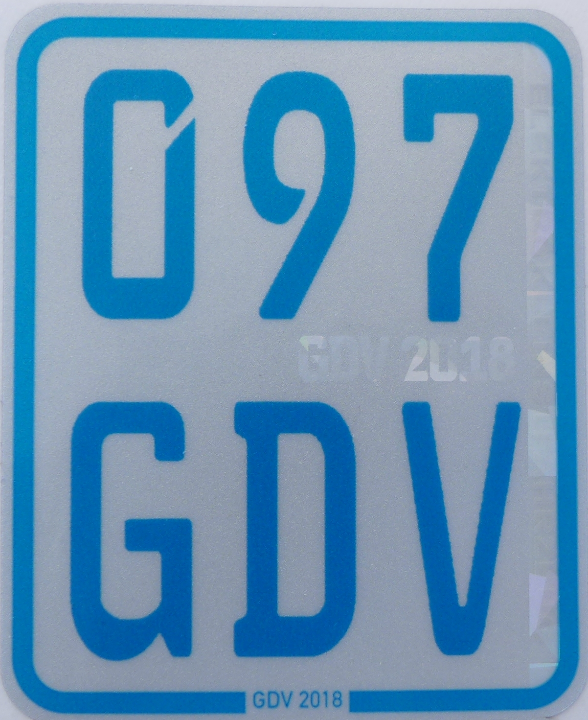 Diese Plakette dokumentiert den Versicherungsschutz und muss an Elektrokleinstfahrzeugen angebracht sein